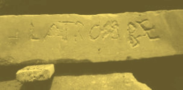 Inscripción para Lucio Cornelio Balbo